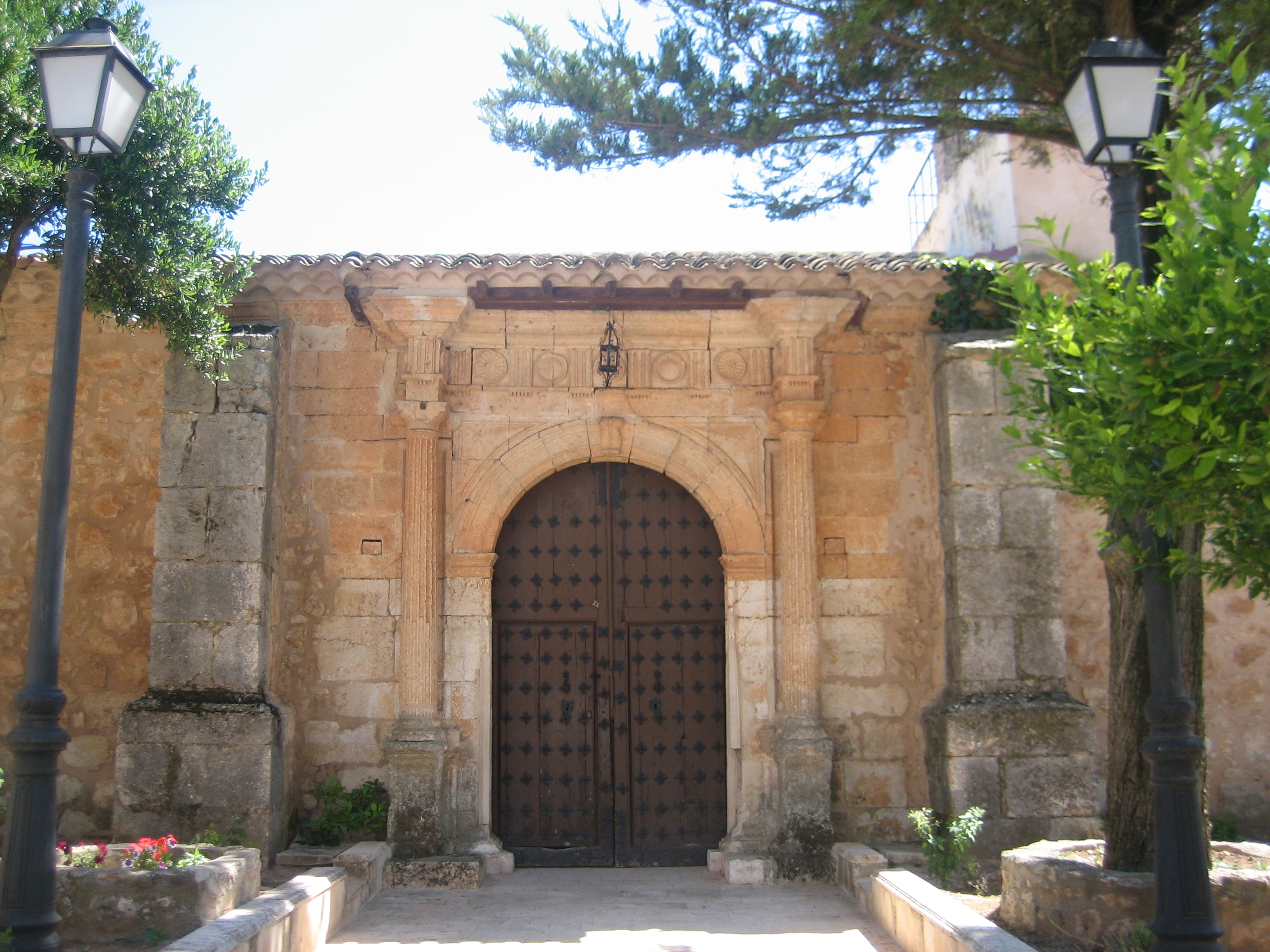 Puerta principal de la Iglesia de la Asunción de Atalaya del Cañavate